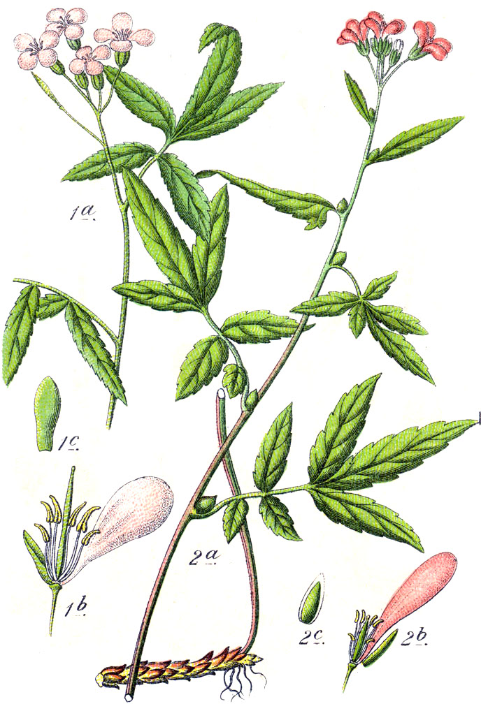 1. Cardamine heptaphylla (Vill.) O. E. Schulz, syn. Crucifera heptaphylla (Vill.) E.H.L.Krause 2. Cardamine bulbifera (L.) Crantz, syn. Crucifera bulbifera E.H.L.Krause Original Caption 1. Siebenblättrige Zahnwurz, Crucifera heptaphylla 2. Zwiebeltragende Zahnwurz, C. bulbifera